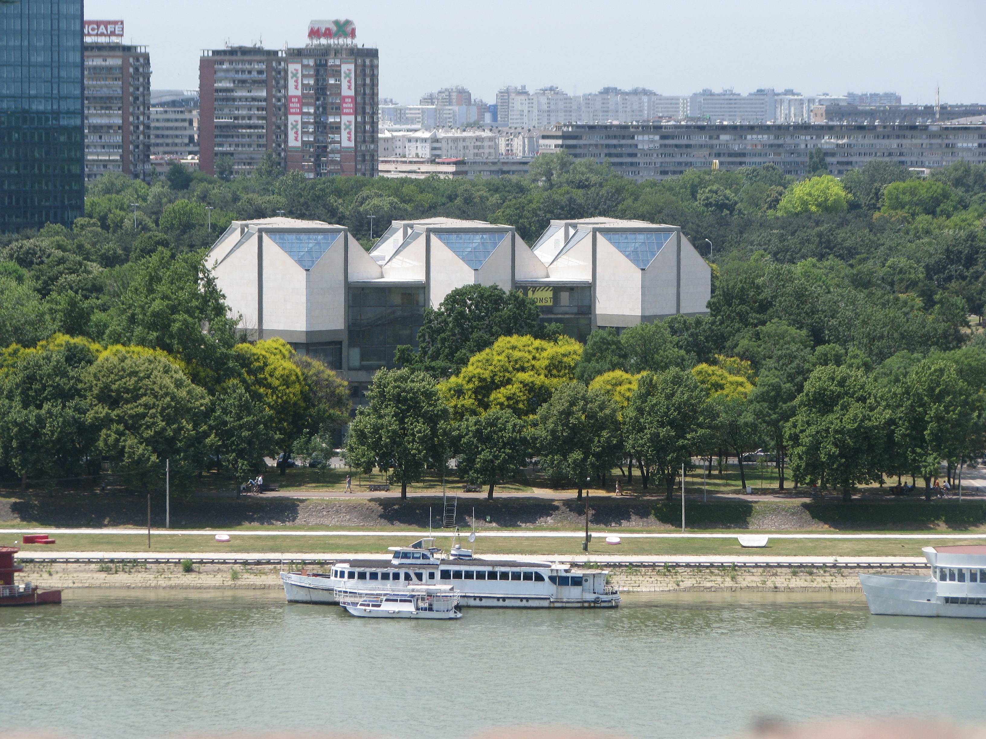 Muzej savremene umetnosti, Beograd, 2011/06/19